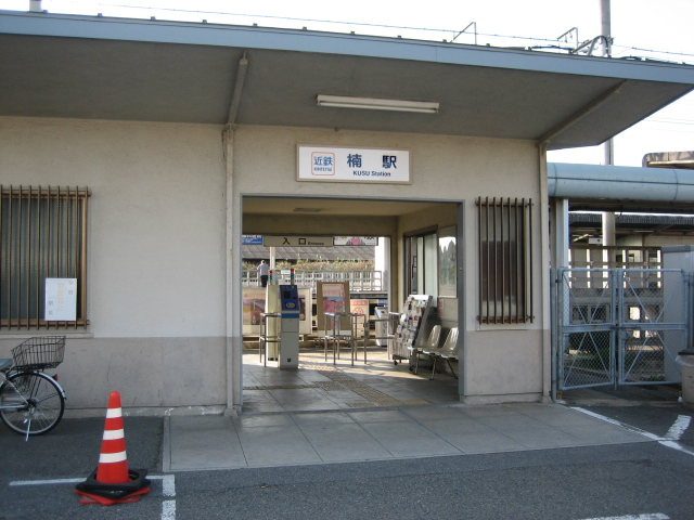 楠駅